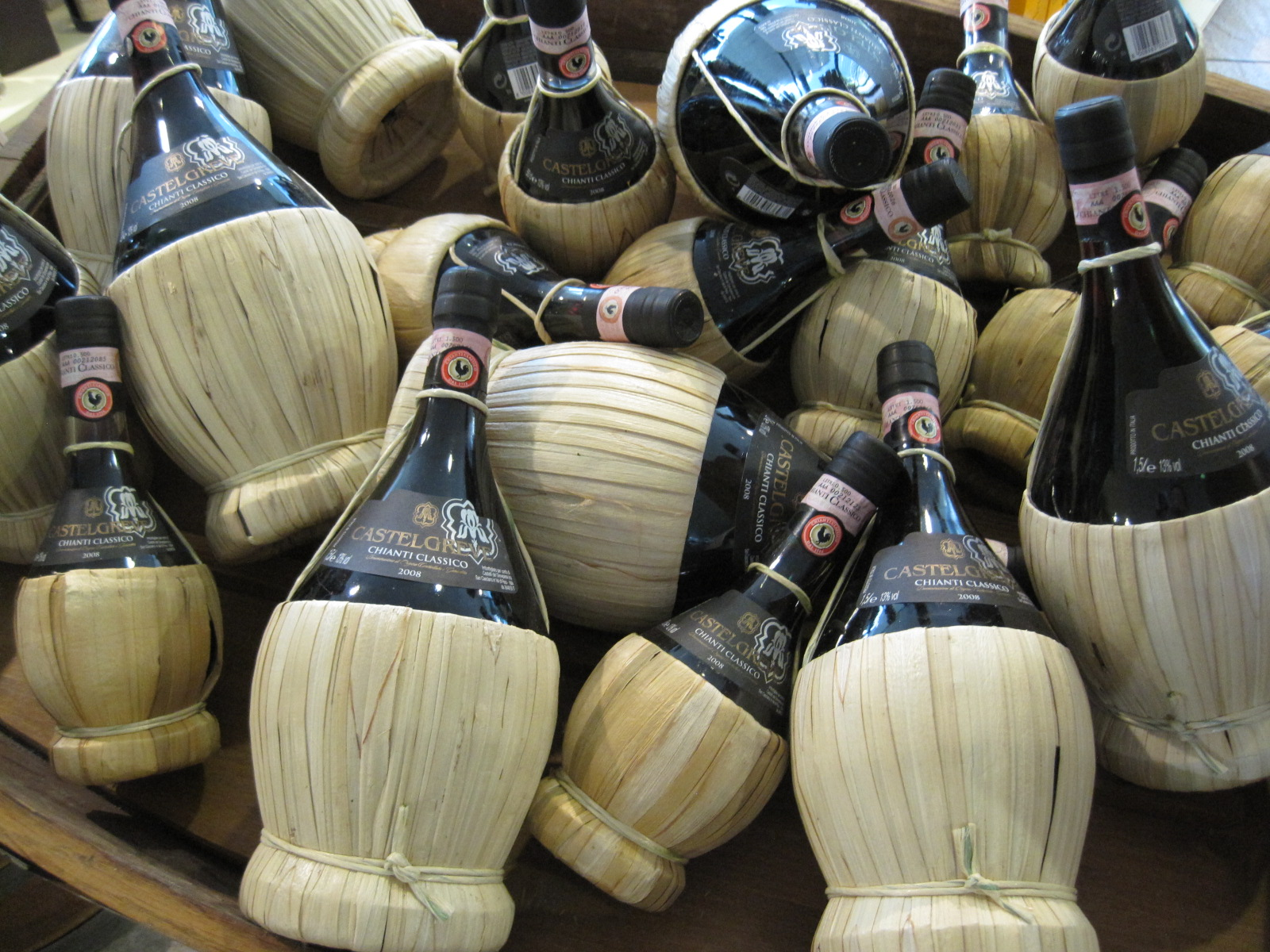 Chianti (wine)